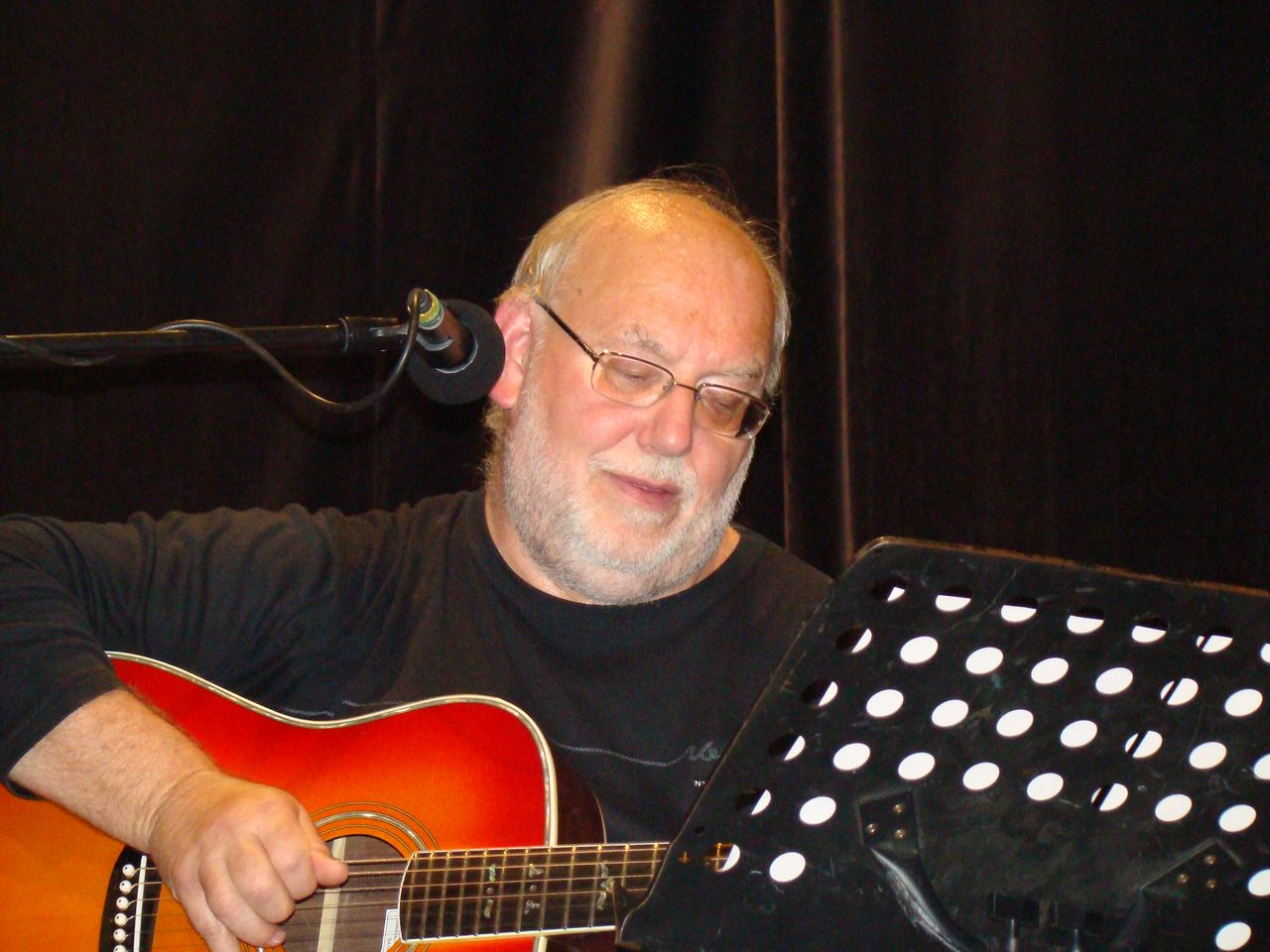 obrázok Honzy Nedvěda, urobila som ho ja na koncerte Senci 2008